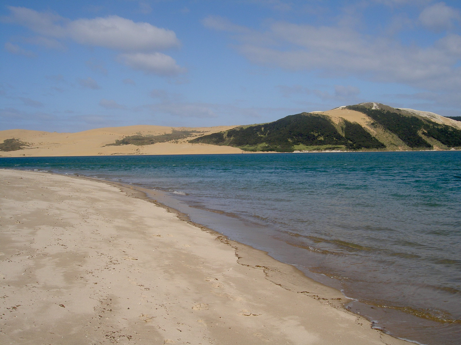 Mit der Ferry geht es auf die Insel bei Opononi zum Sandboarden / Opononi beach, Hokianga, Northland, New Zealand